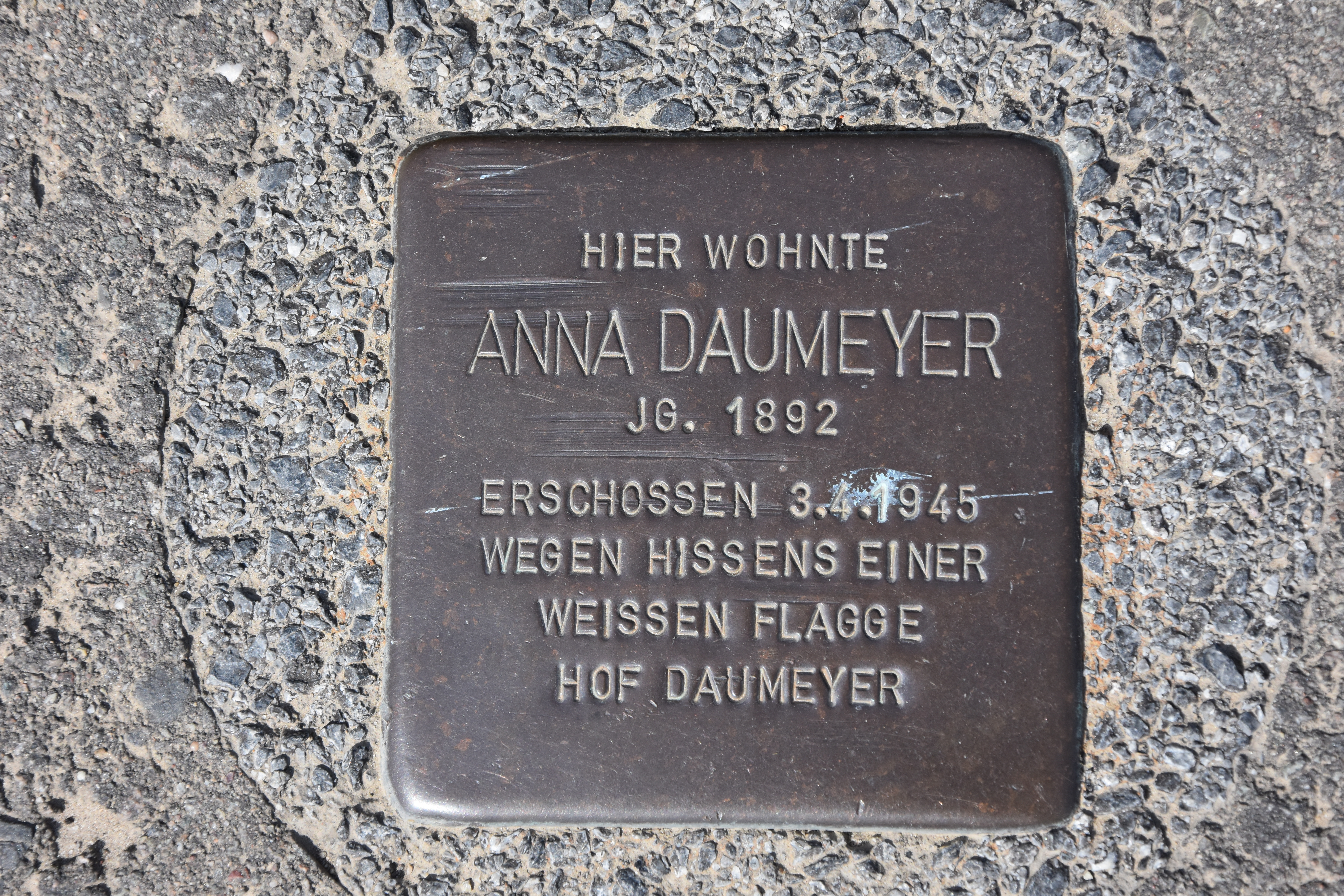 Nordstraße 60 , Osnabrück Darum-Gretesch-Lüstringen Geburtstag: 18.11.1892 Geburtsort: Osnabrück Todesdatum: 03.04.1945 Todesort: Eigener Bauernhof, Osnabrück Opfergruppe: politisches Opfer Verlegetermin: 15. Mai 2009